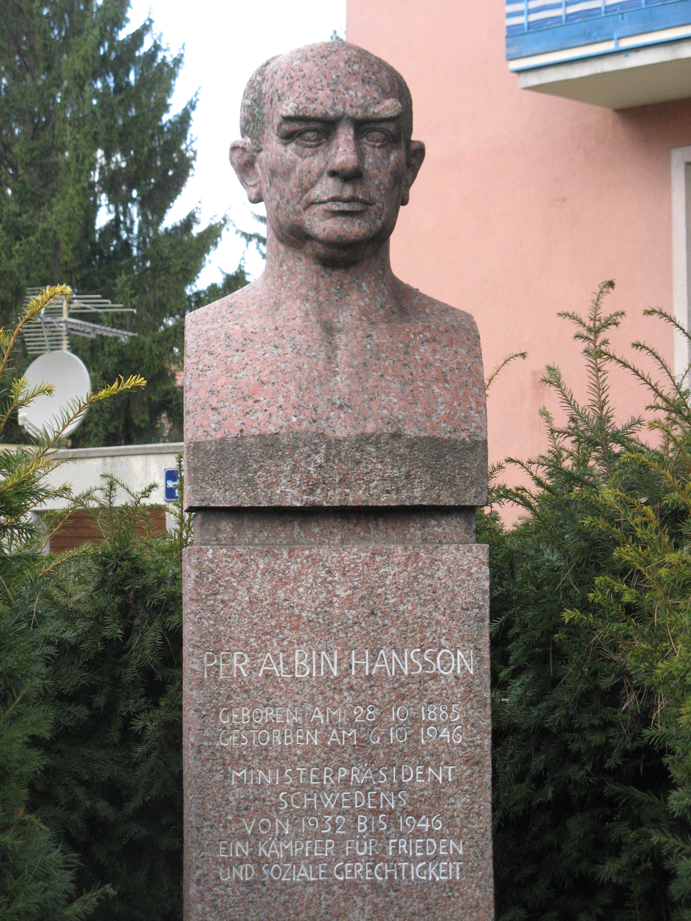 Denkmal für Per Albin Hansson, Stockholmer Platz, Wien-Favoriten